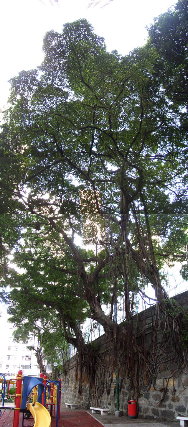 由Chungpui攝於香港島西營盤玫瑰里。